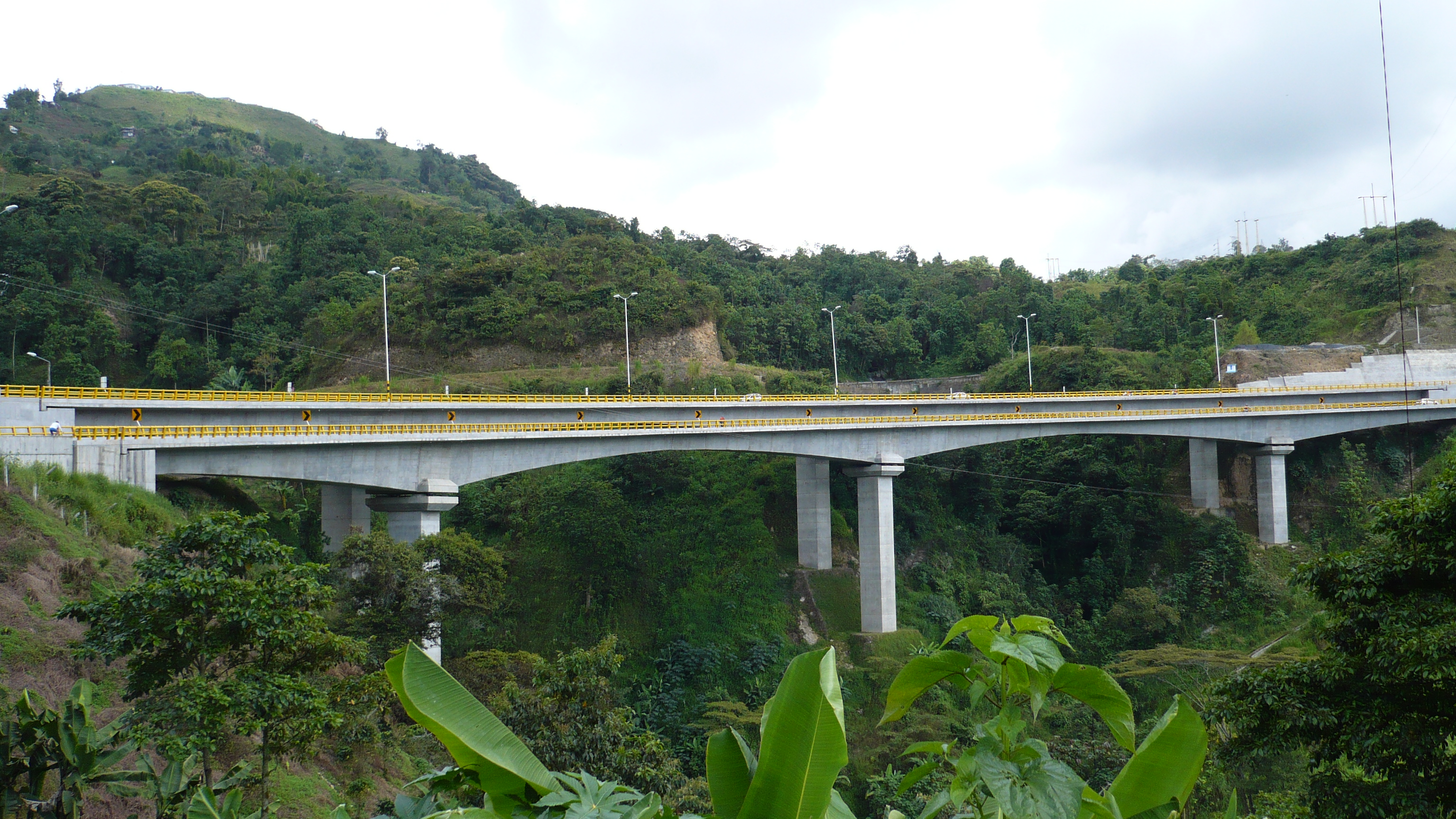 Viaductos de La Estampilla en las "Autopistas del Café", a la entrada de Manizales, Caldas. Bridge: La Estampilla (Two parallel viaducts) Location: Manizales, Colombia Opened: 2008